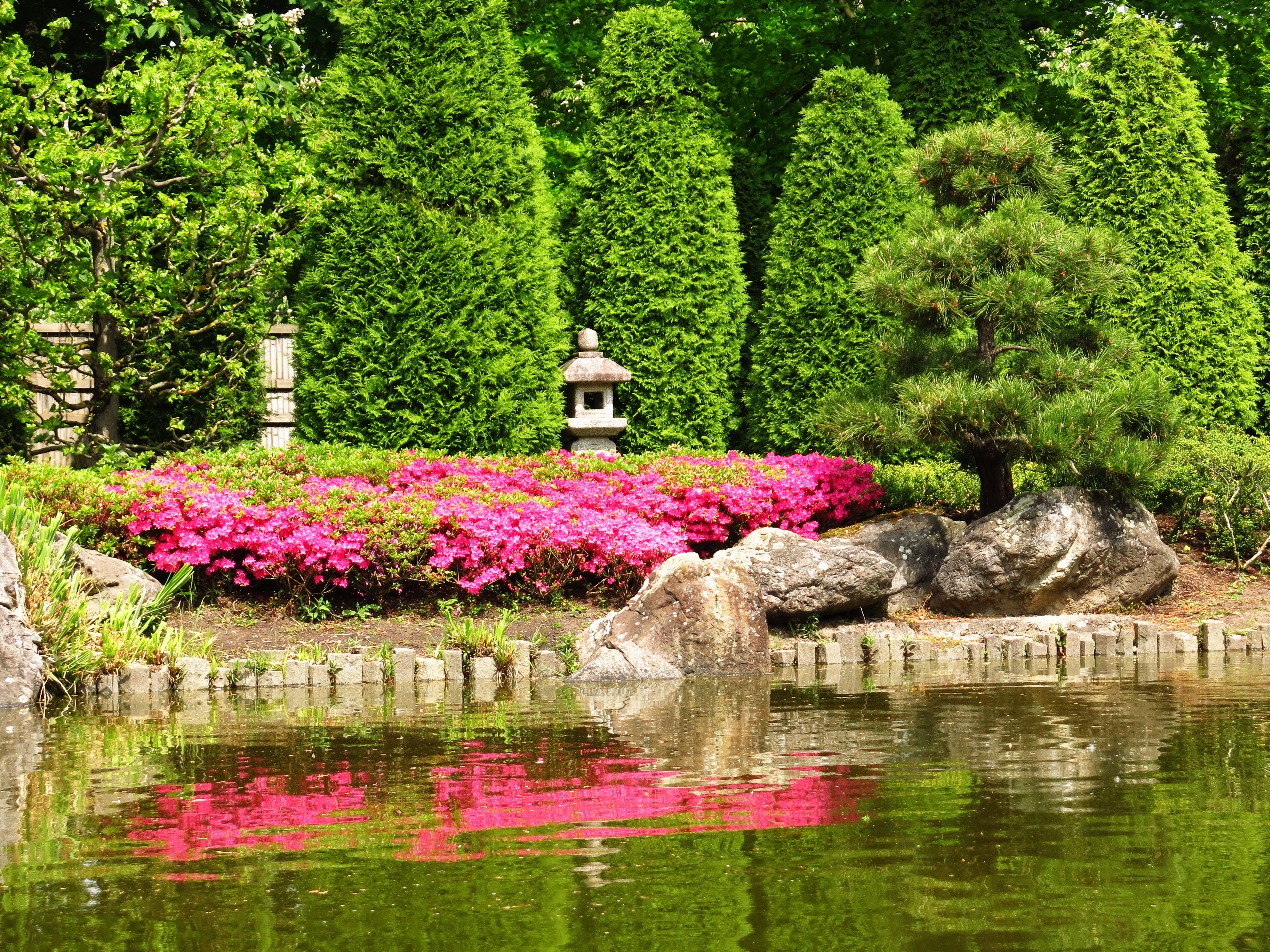 Japanischer Garten in der Bonner Rheinaue; Steinlaterne (Oribe) am Weg.